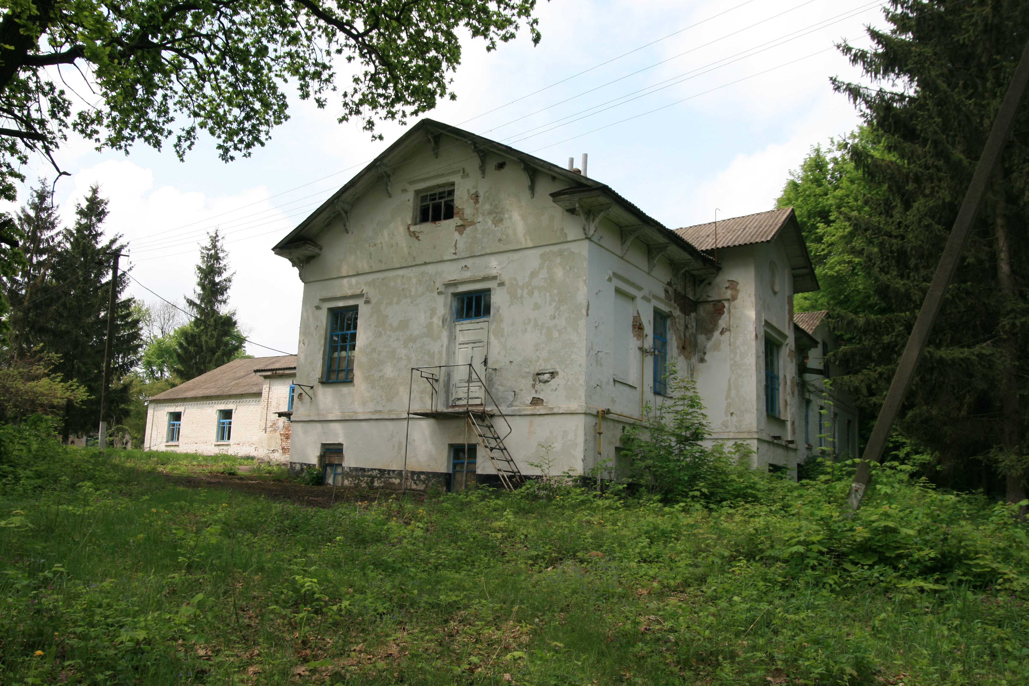 Садибний будинок (мур.), село П'ятигори